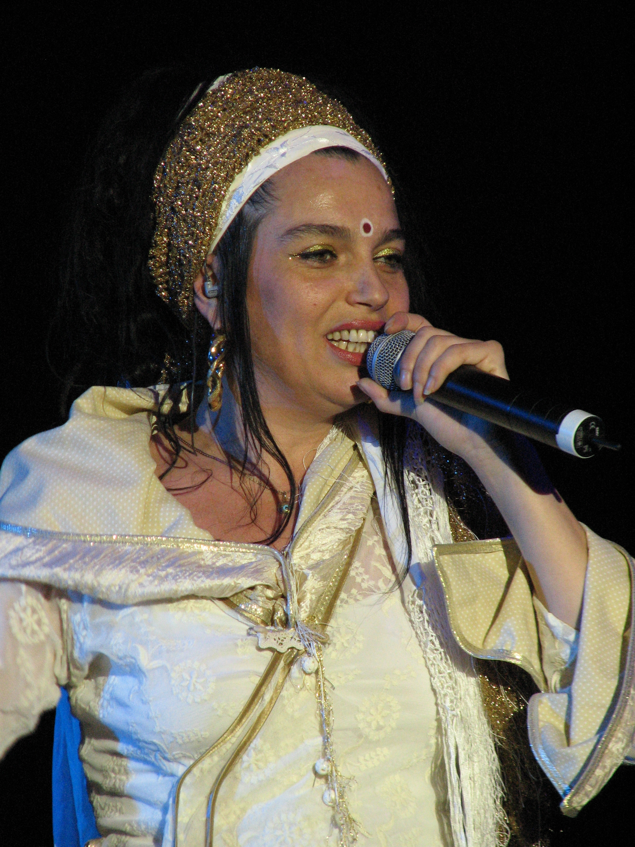 Marina "la Canillas", singer in Ojos de Brujo at concert in Espacio Movistar, Barcelona.